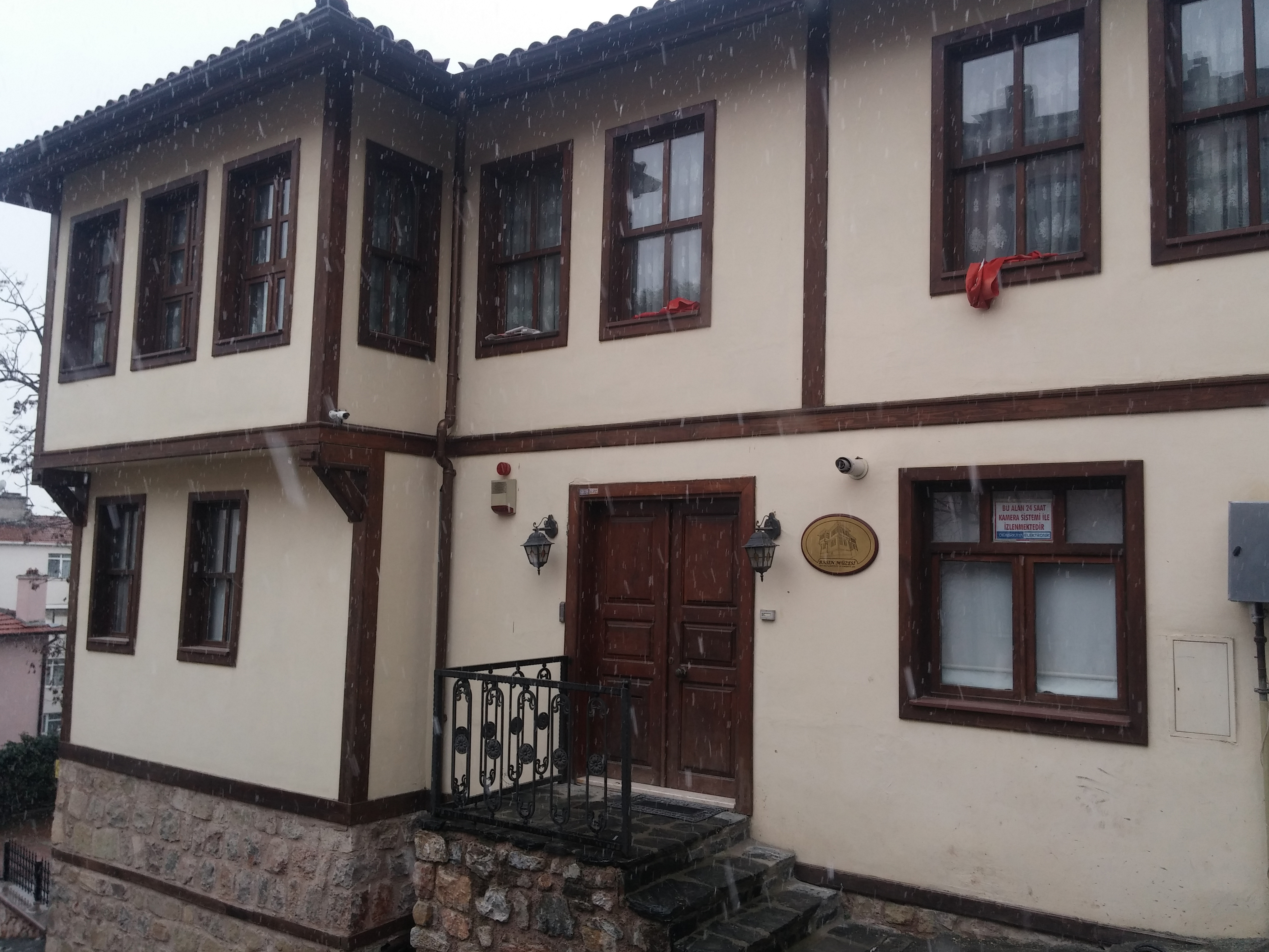 Kocaeli Basın Müzesinden bir görünüm.